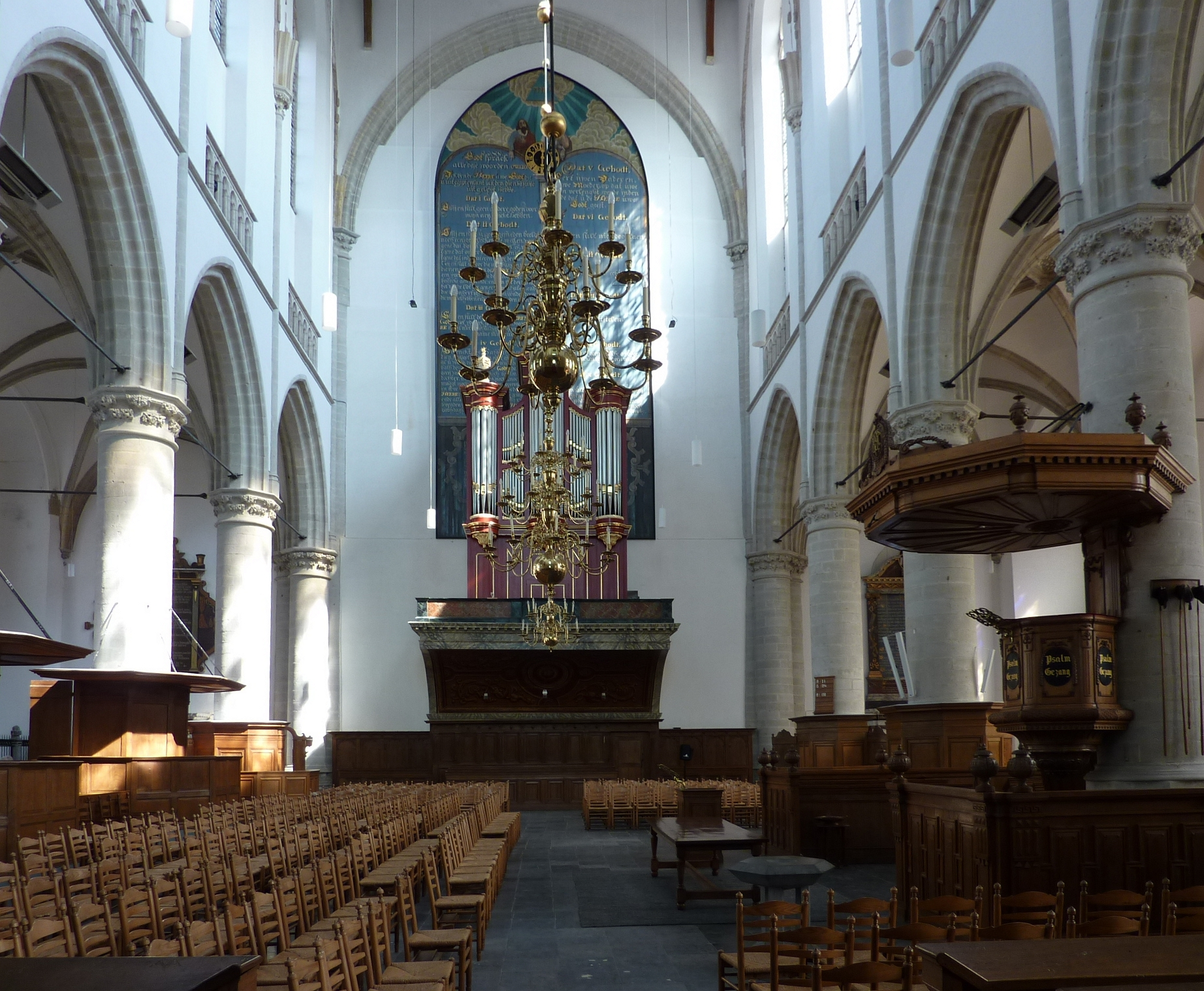 Catharijnekerk Brielle